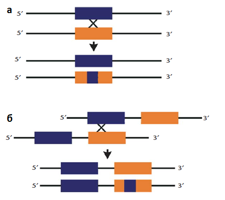 а -аллельная генная конверсия б -неаллельная генная конверсия